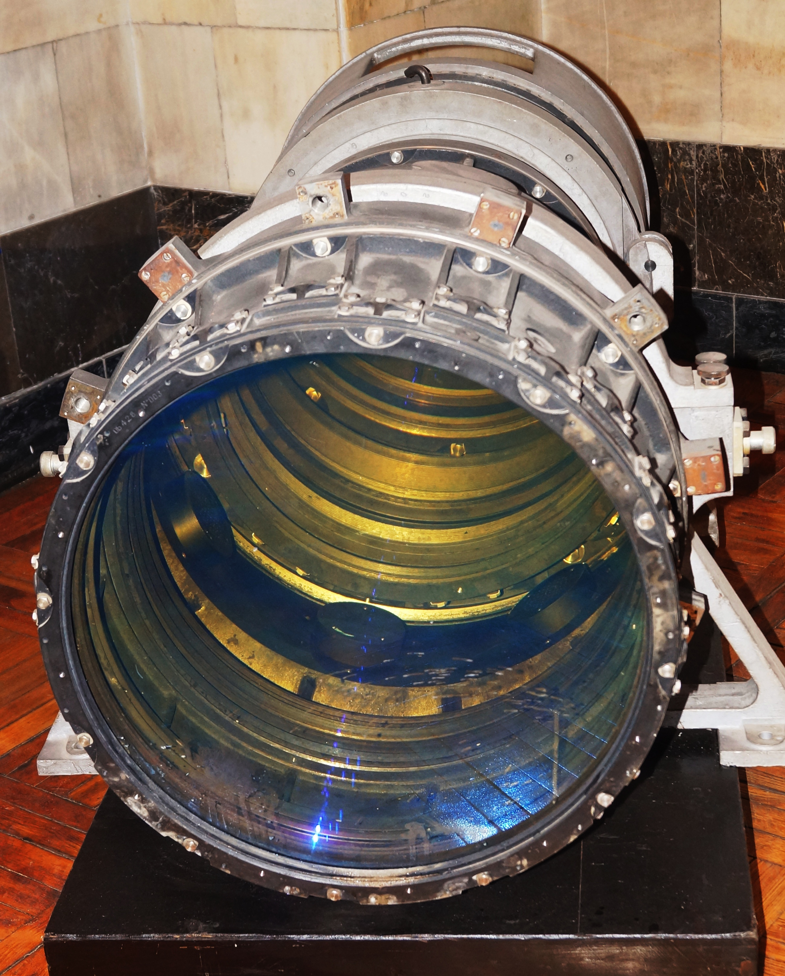 Фотообъектив Мезон-2А для съёмки поверхности Земли с околоземной орбиты